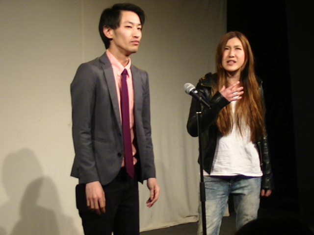 納言 (2018年4月)